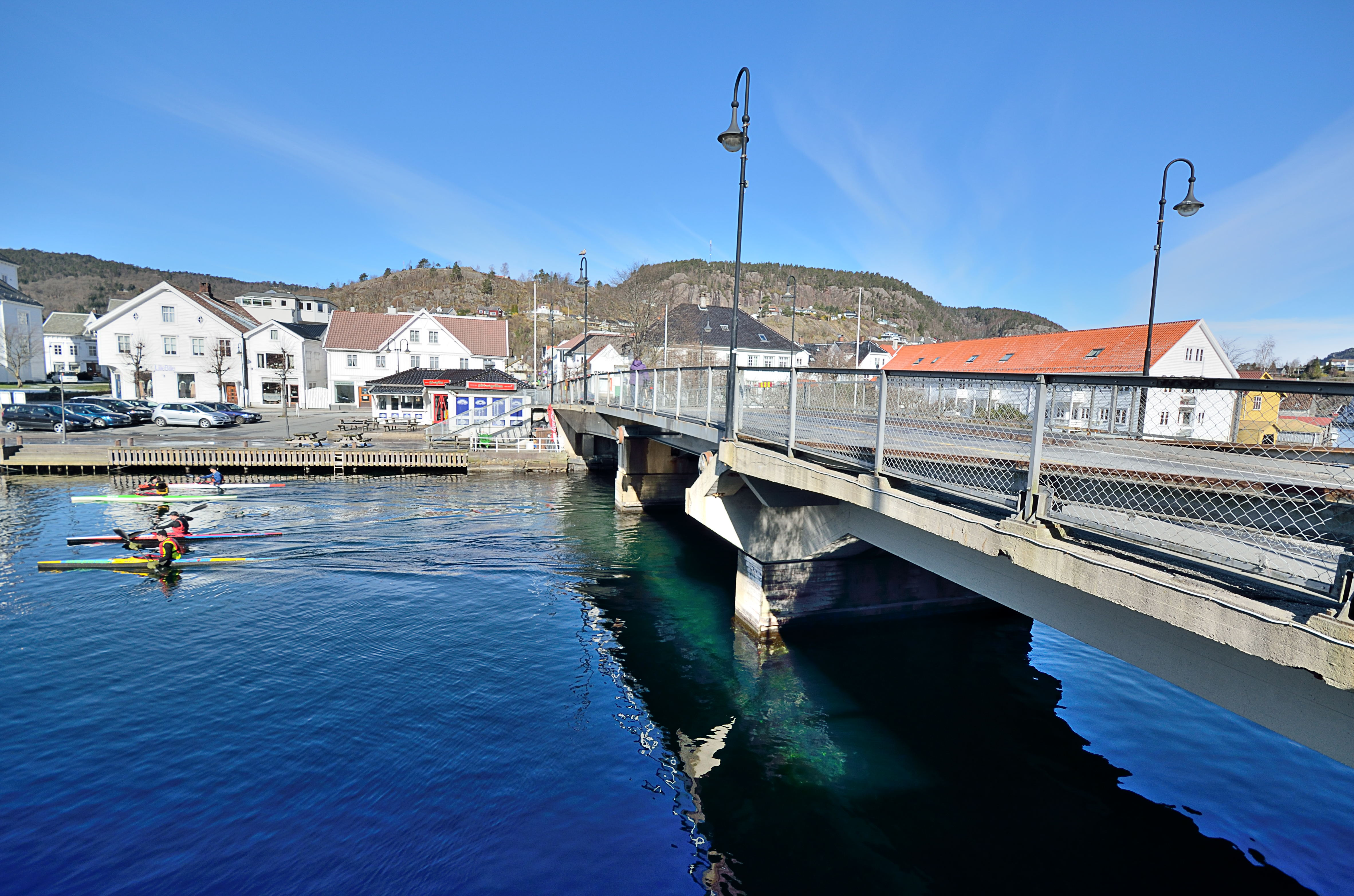 Flekkefjord bro